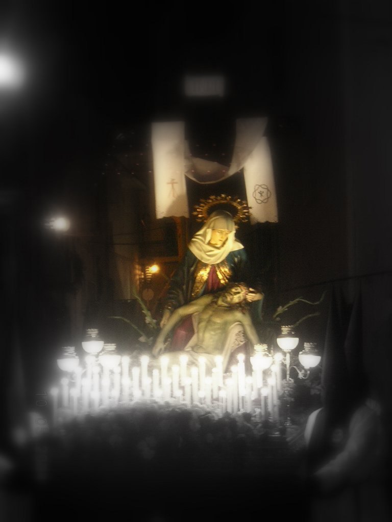 Cofradía Andorra (Teruel)